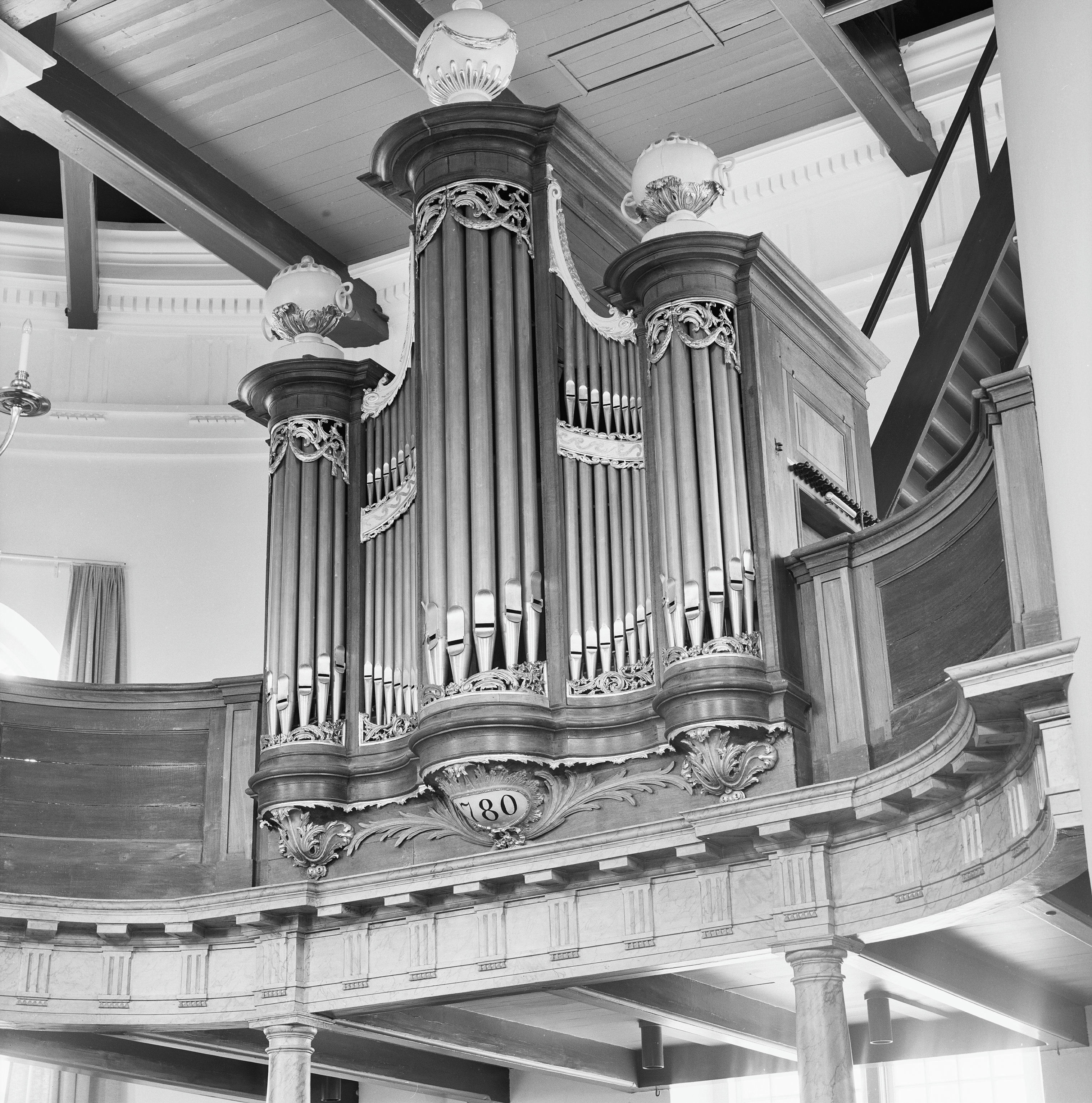 N.H.Kerk: orgel